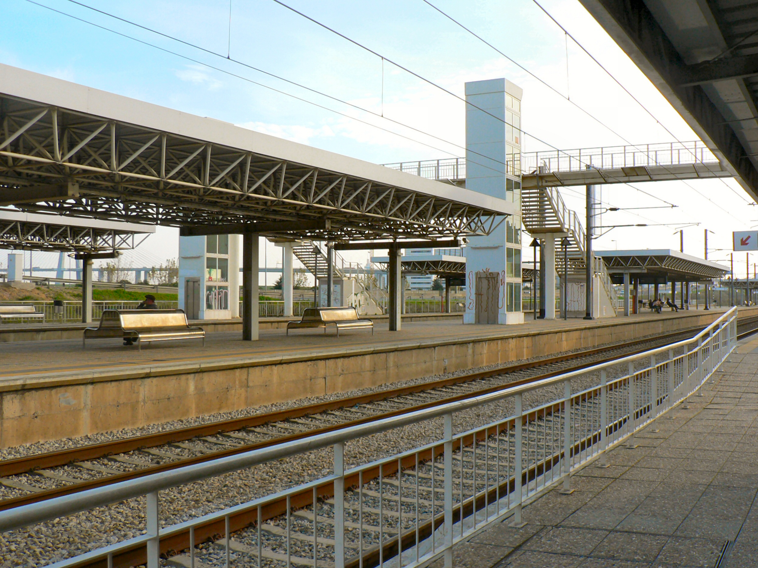 Estação dos Caminhos de Ferro de Sacavém